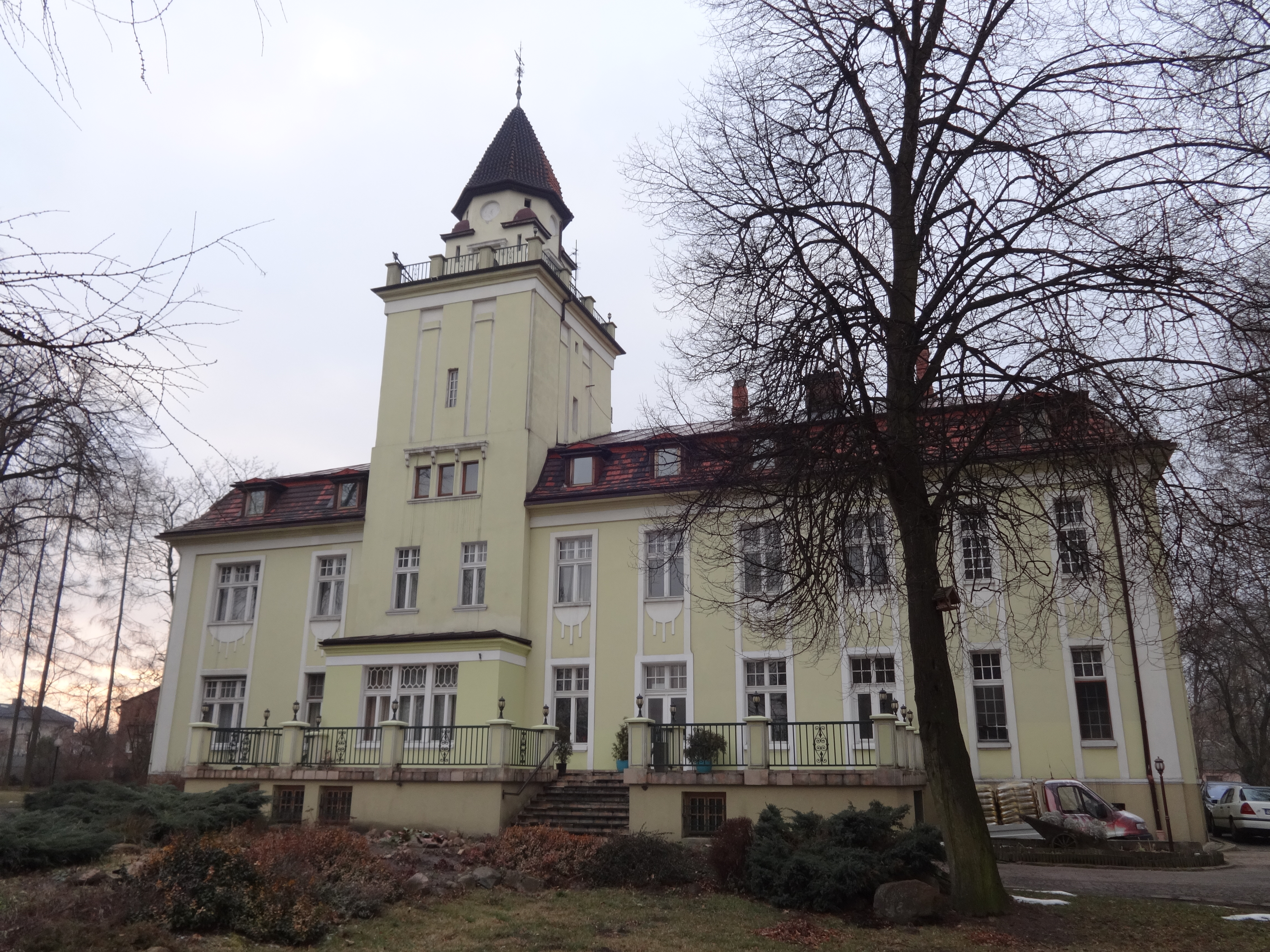 Nieznanice, park, l. 20. XX